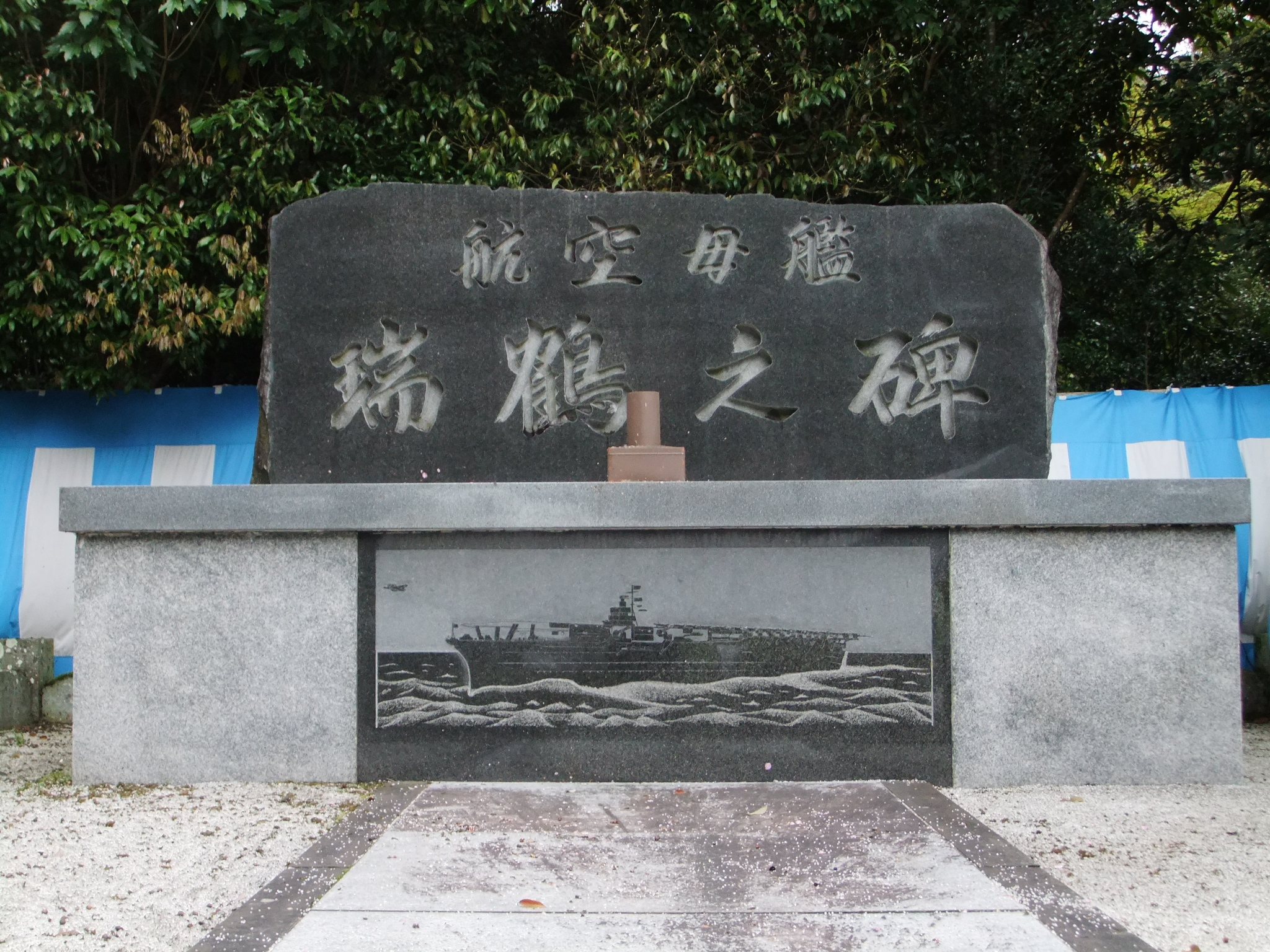 橿原公苑内の航空母艦瑞鶴之碑